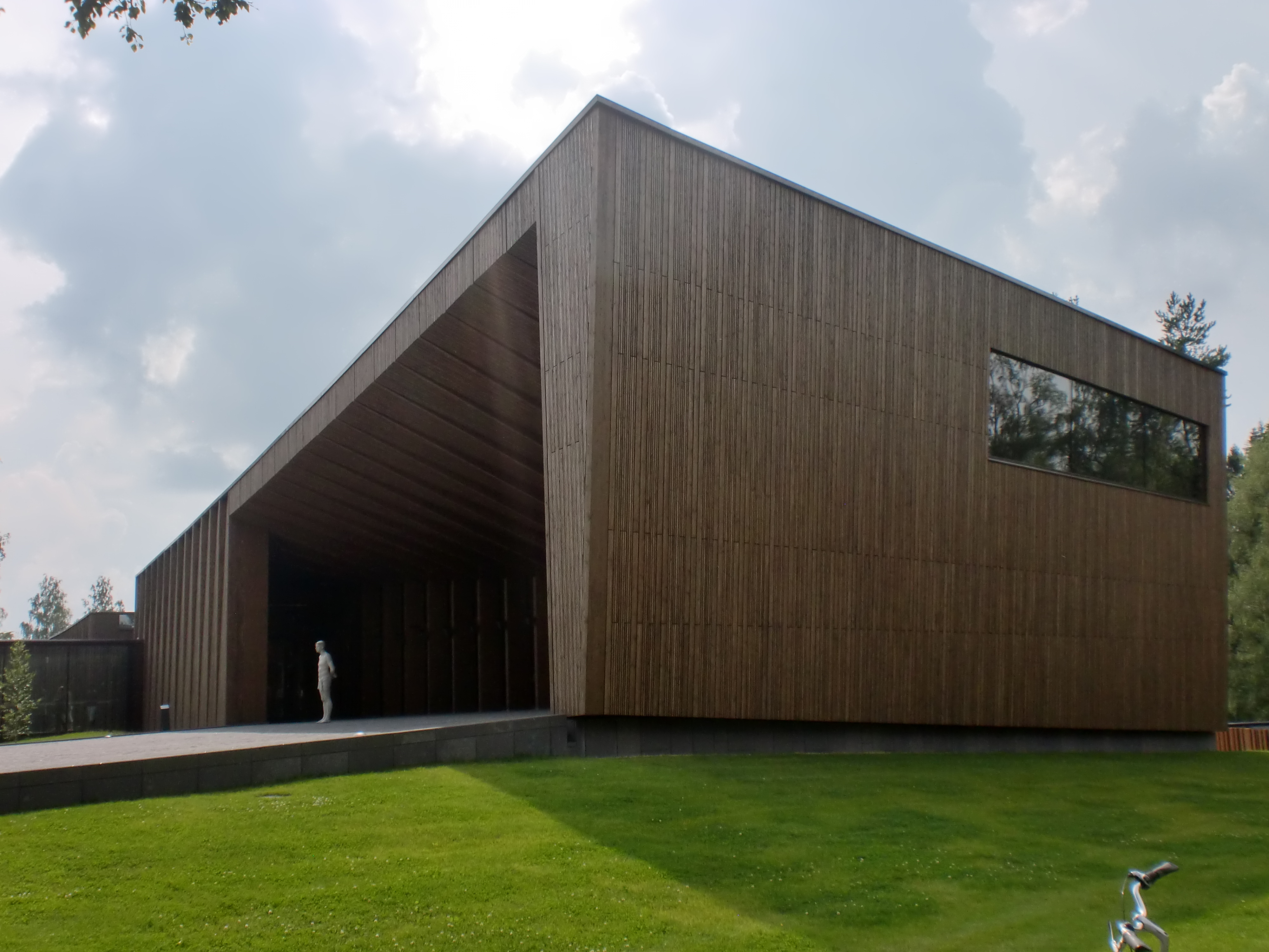 Taidemuseo Gösta; This is a photo of a monument in Finland identified by the ID 'Art museum Gösta' (Q20252372)